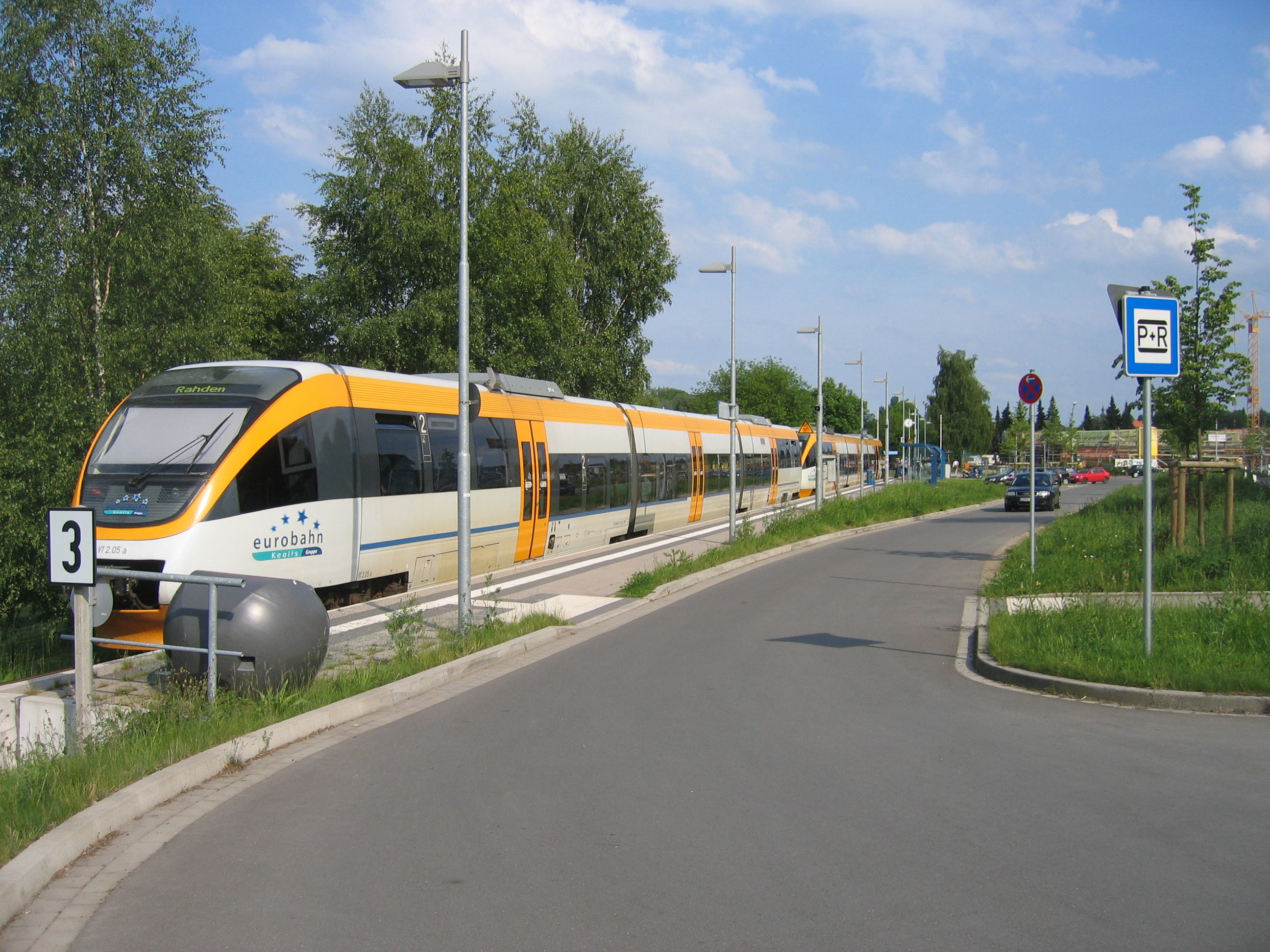 Eurobahn-Endstation Lemgo-Lüttfeld, Kreis Lippe, NRW